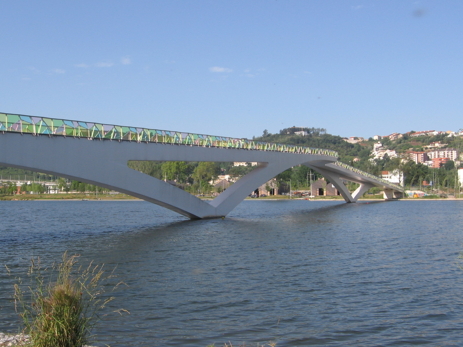 Ponte pedonal Pedro e Inês. Coimbra. Portugal